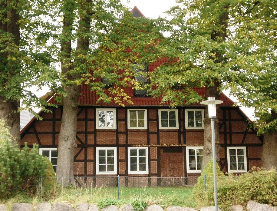 Altes Bauenhaus in Groß Parin / Bad Schwartau